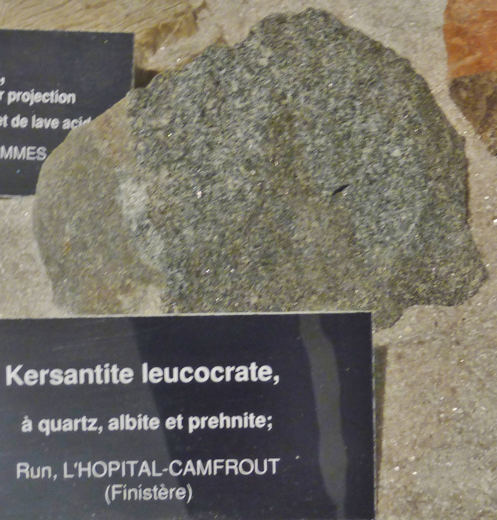 Kersantite leucocrate à quartz, albite et prehnite, trouvée à Run en L'Hopîtal-Camfrout (Finistère) (exposée au Tropical Parc de Saint-Jacut-les-Pins)